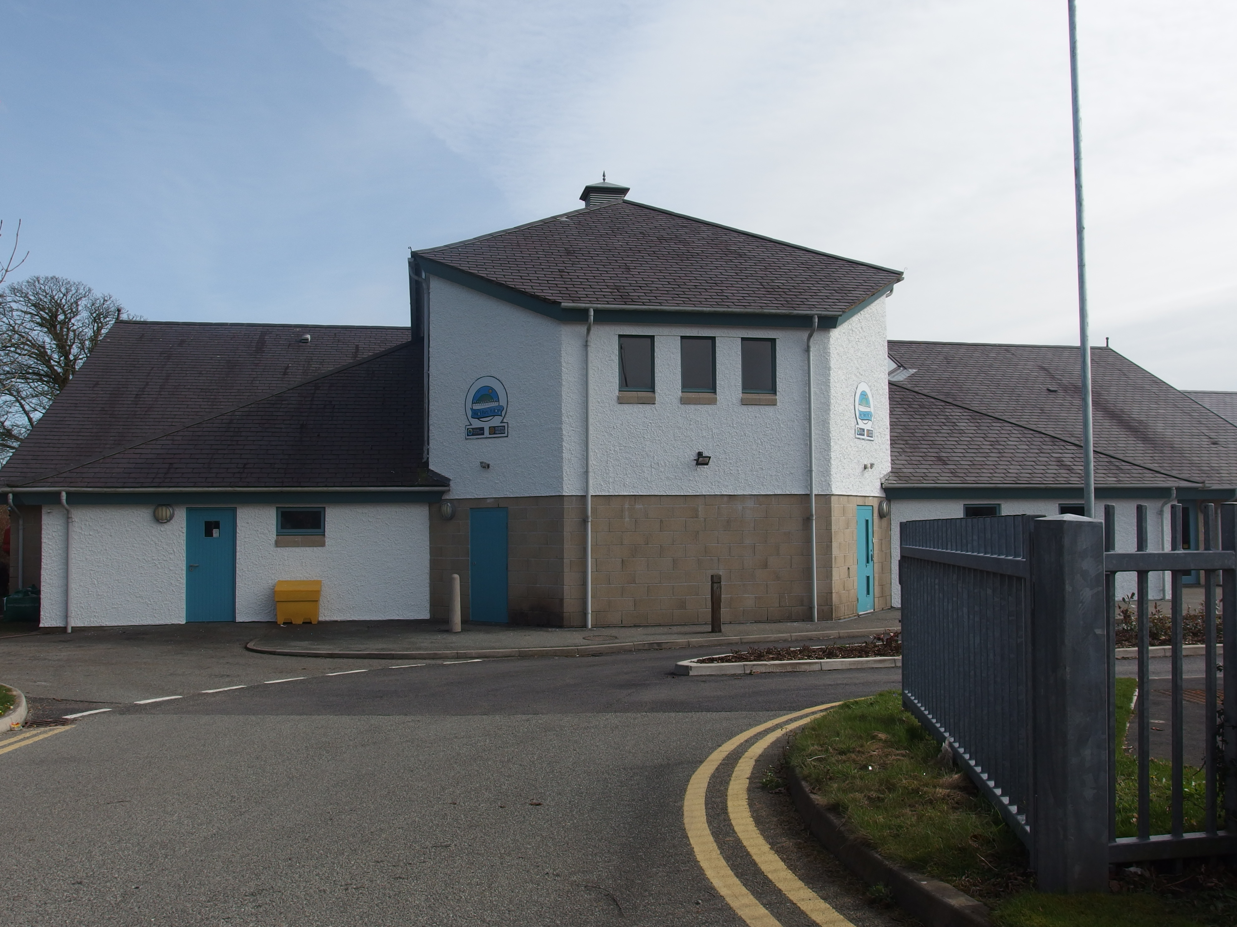 Llun o ysgol Parc y Bont